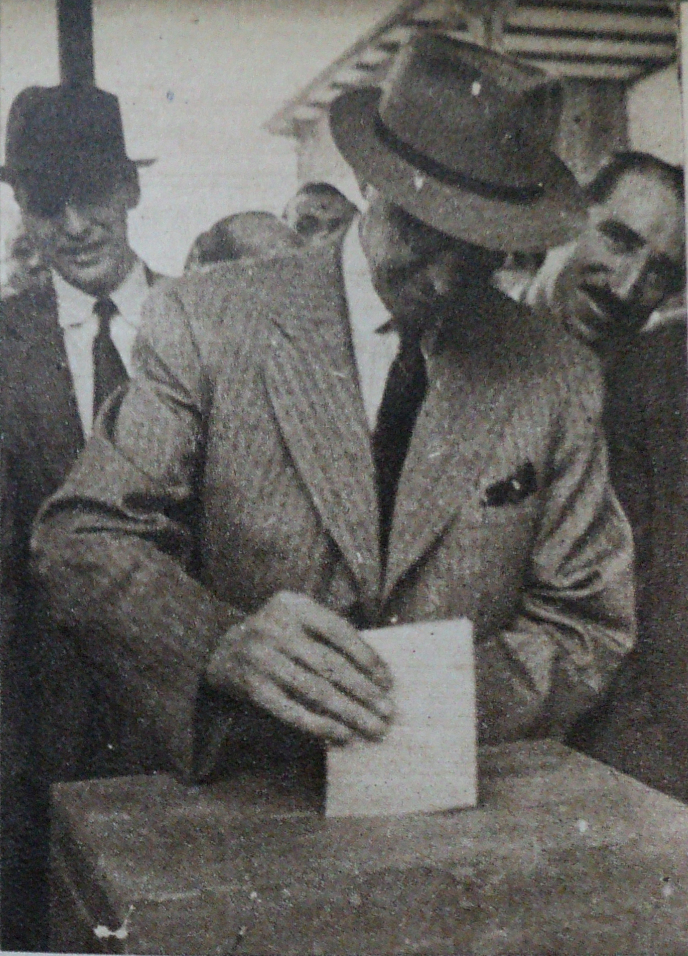 Juan Antonio Ríos votando en 1942